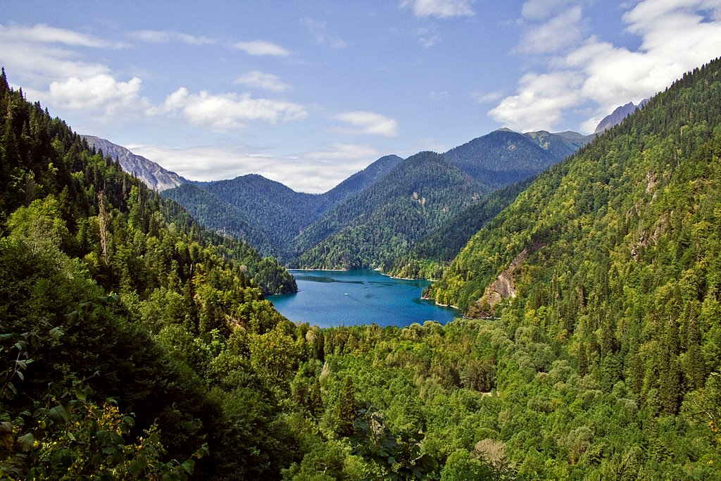 Рица